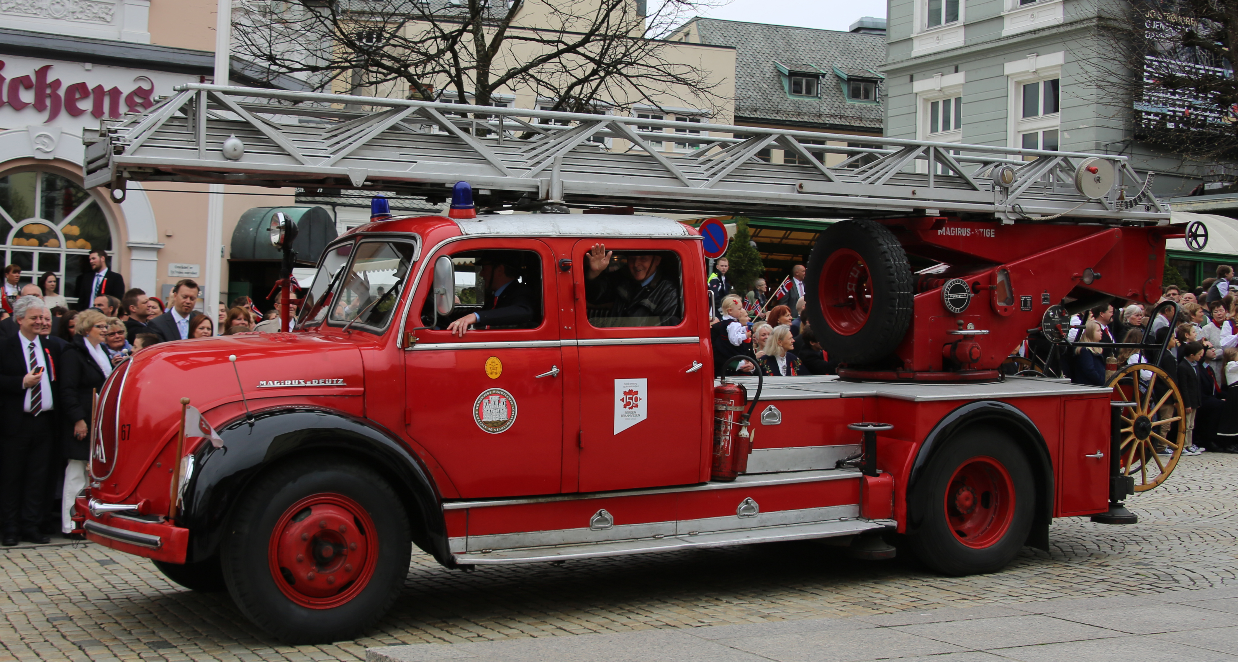 Bergen brannvesen